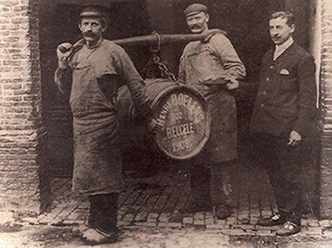 Brouwerij Boelens - Belsele - Sint-Niklaas - Oost-Vlaanderen - België